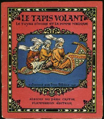 Ковер-самолет